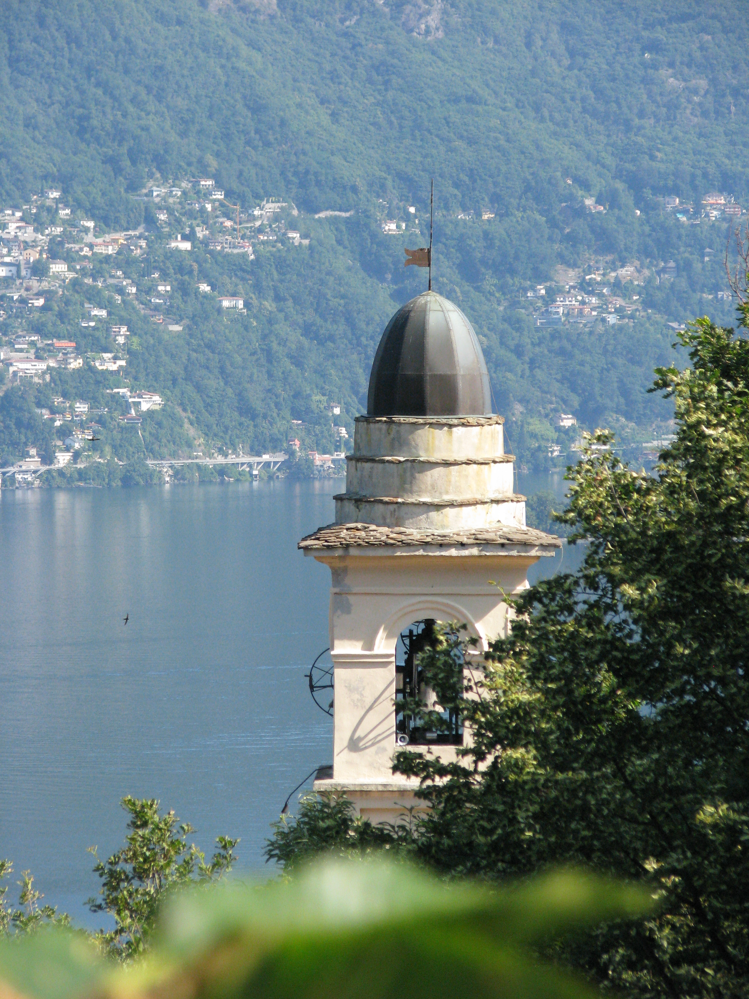 Campanile